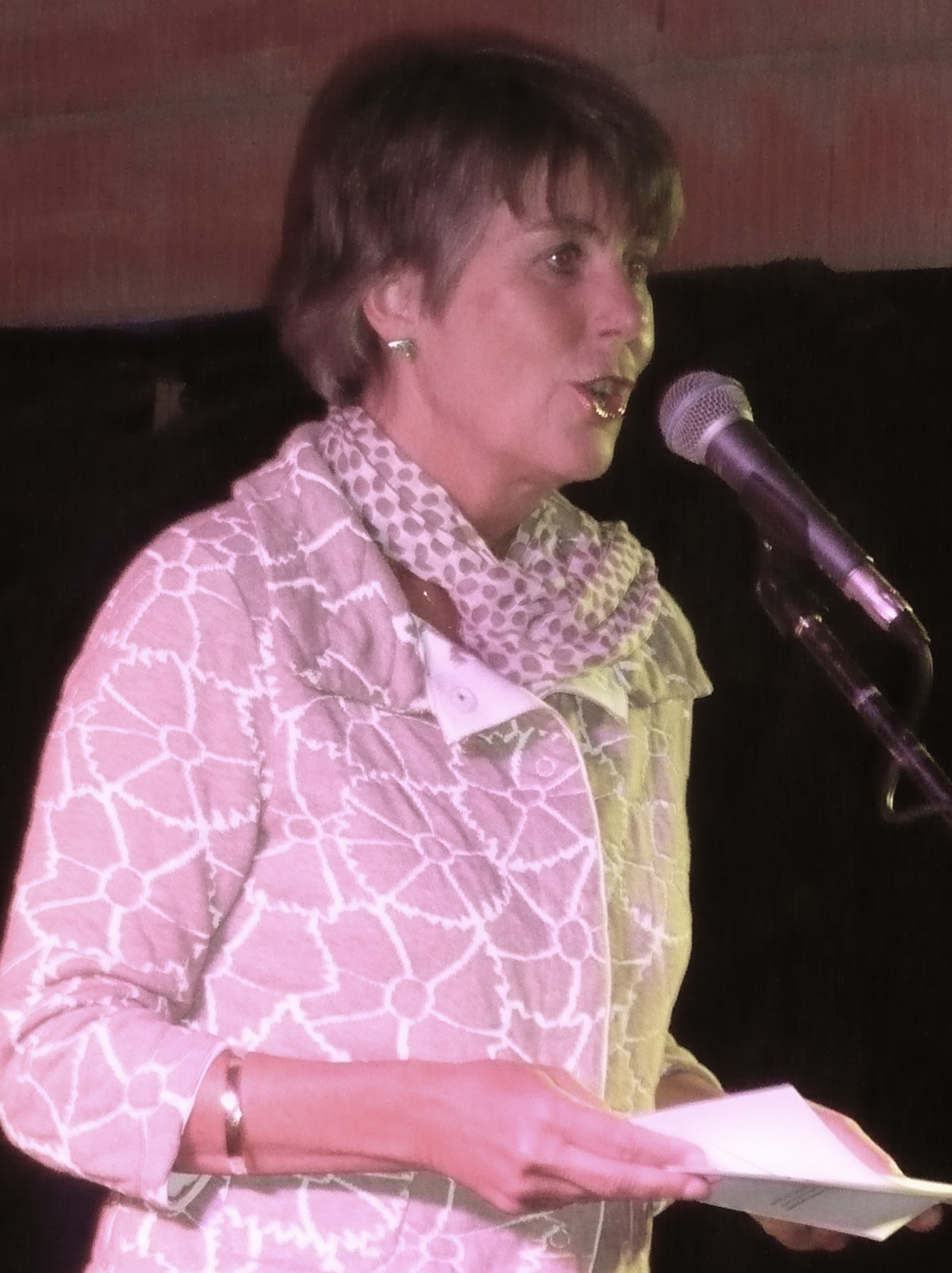 Brigitte Merk-Erbe spricht in der Schoko anlässlich der Revival-Party zum 40. Jahrestag des Offenen Jugenzentrums Bayreuth